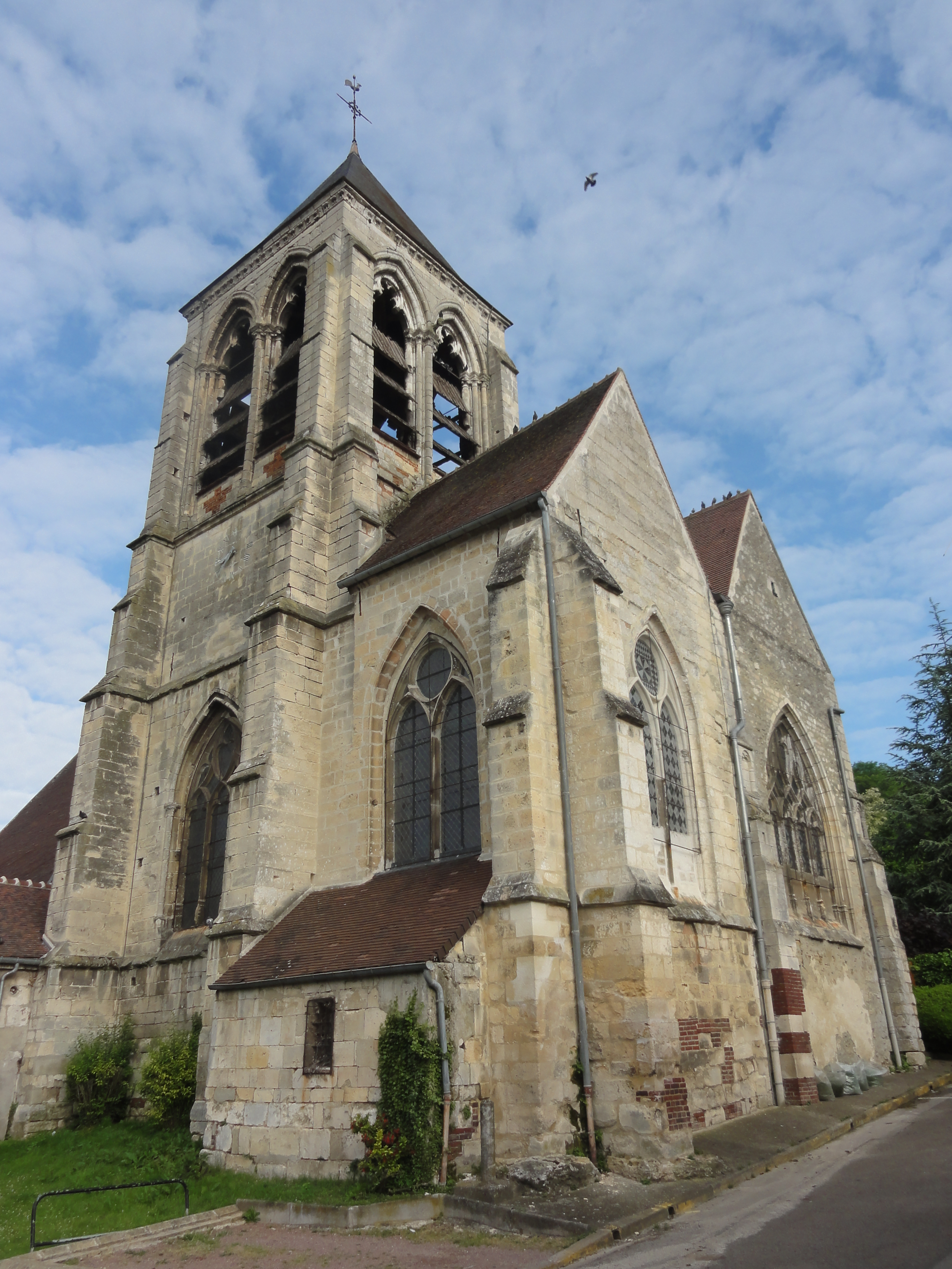 Parties orientales et clocher, vue depuis le sud-est.